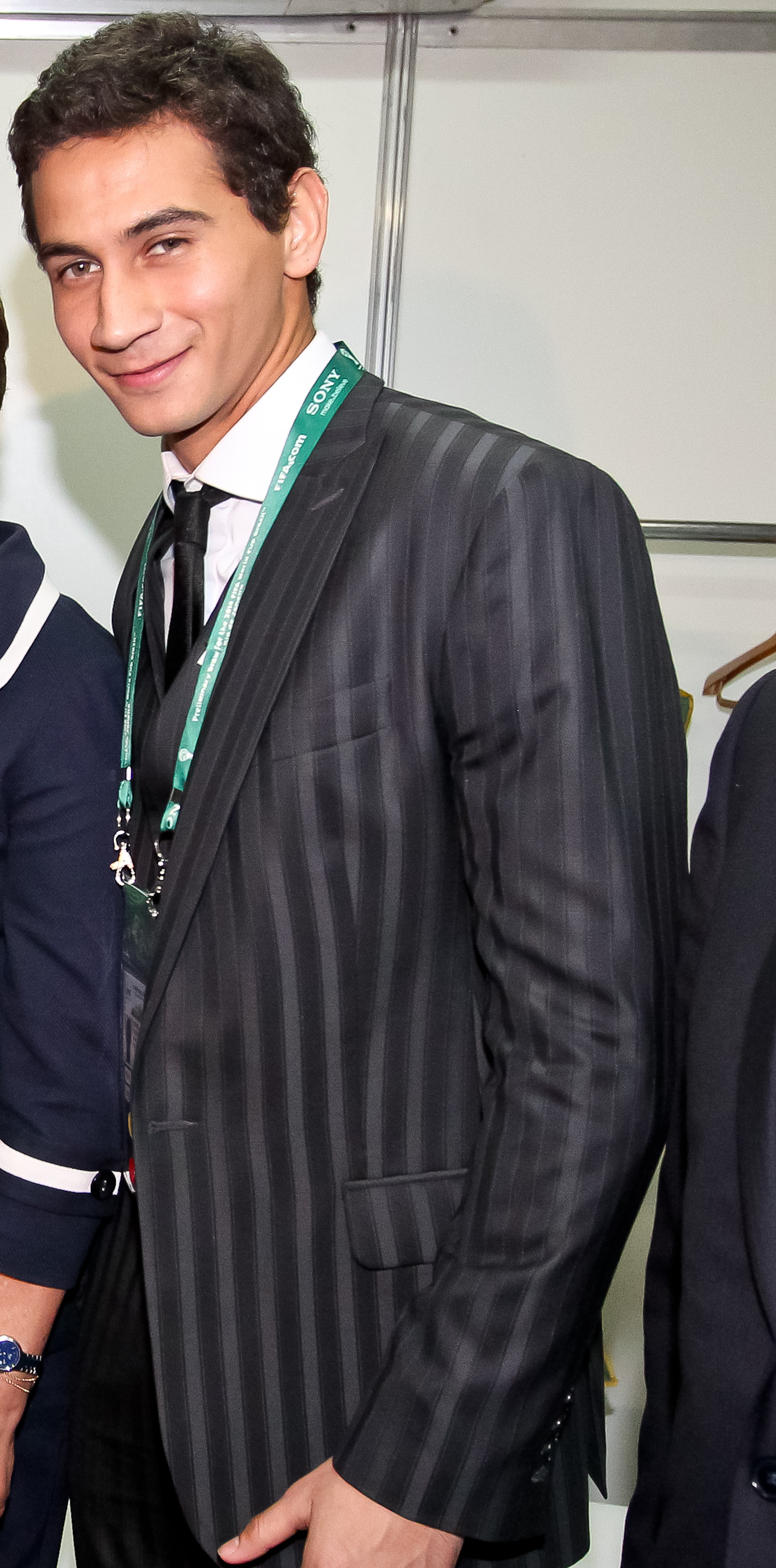 Presidenta Dilma Rousseff posa para foto com os jogadores Neymar, Lucas e Ganso após a cerimônia de sorteio preliminar da Copa do Mundo (Rio de Janeiro,RJ,30/07/2011) Foto: Roberto Stuckert Filho/PR